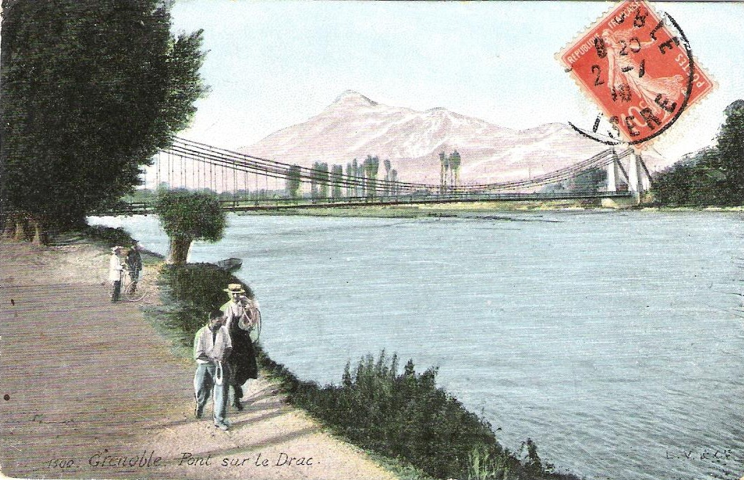 Pont en chaîne de fer sur le Drac ouvert en février 1828 entre Grenoble et Fontaine. Le cours Berriat a été tracé quelques années plus tard pour desservir ce pont.